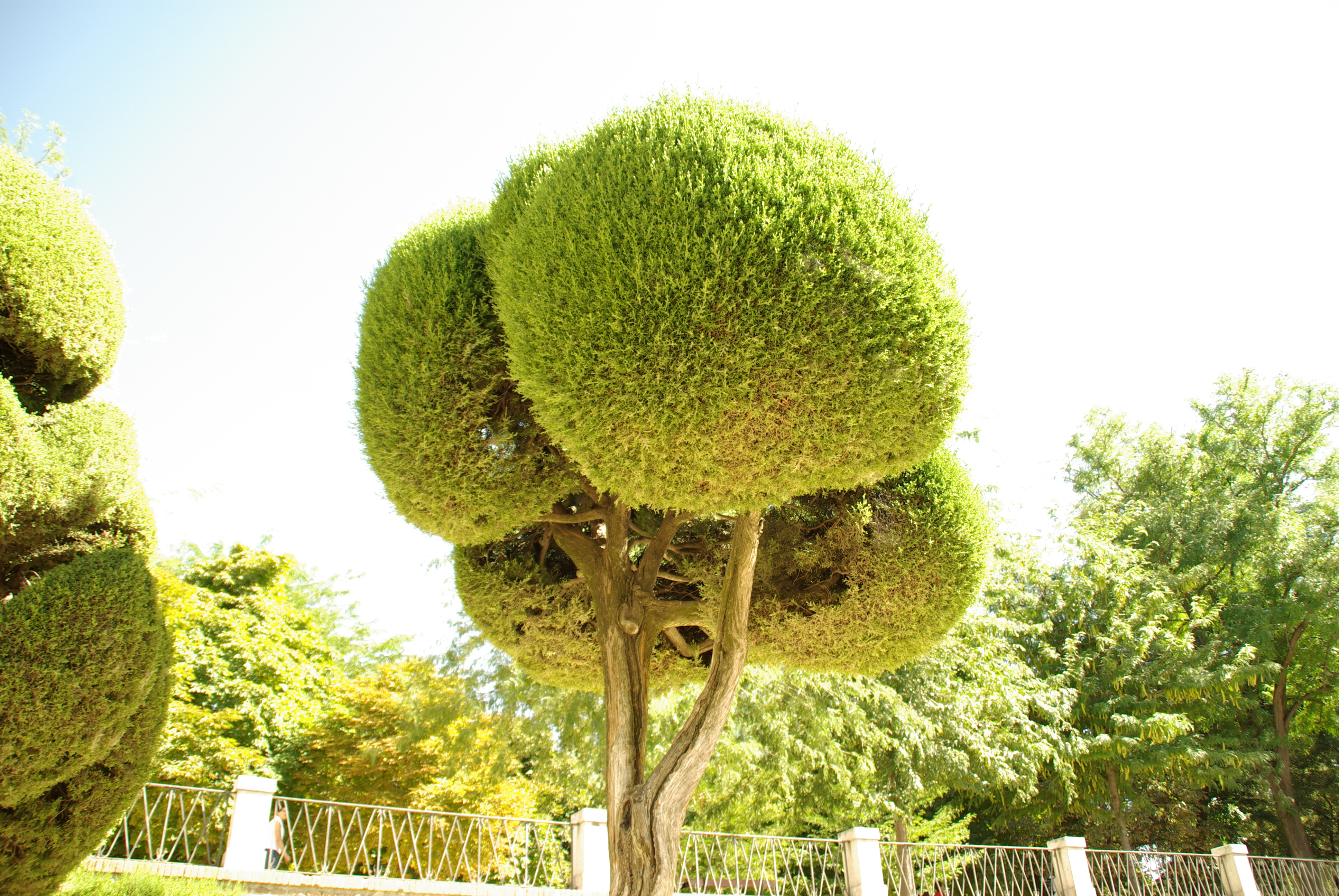 ® S.D. (ES,EN) MADRID-PARQUE DE EL RETIRO-ARTE TOPIARIO